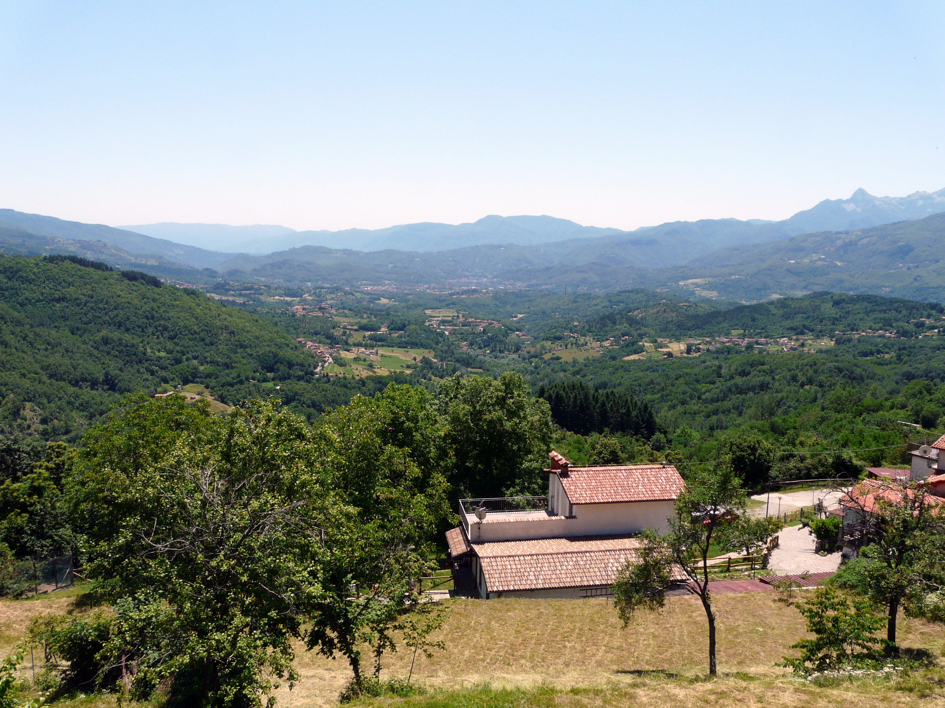 Panorama da Corfino, Villa Collemandina, Toscana, Italia